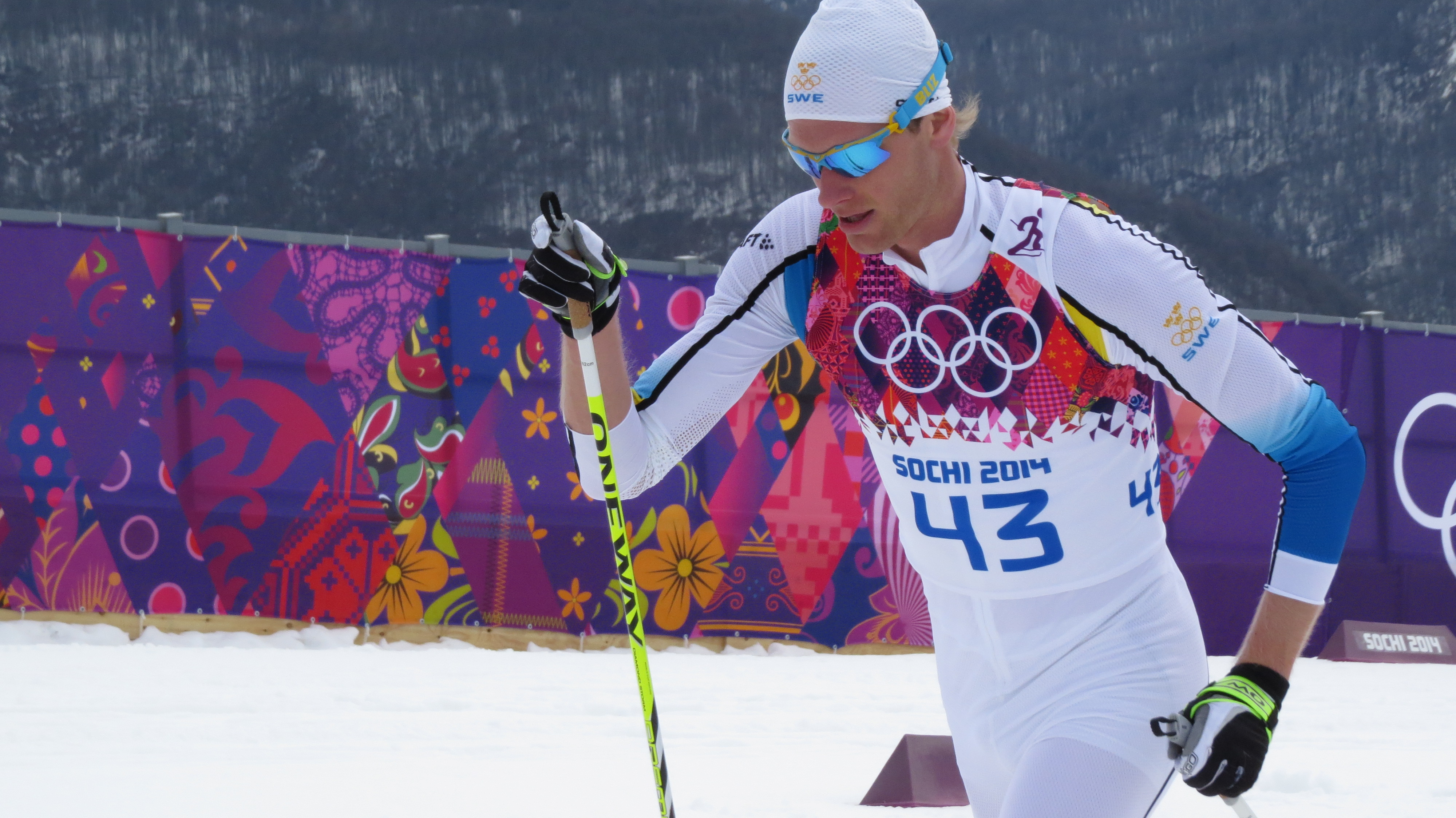 Лыжные гонки на зимних Олимпийских играх 2014 — 15 км классическим стилем (мужчины)